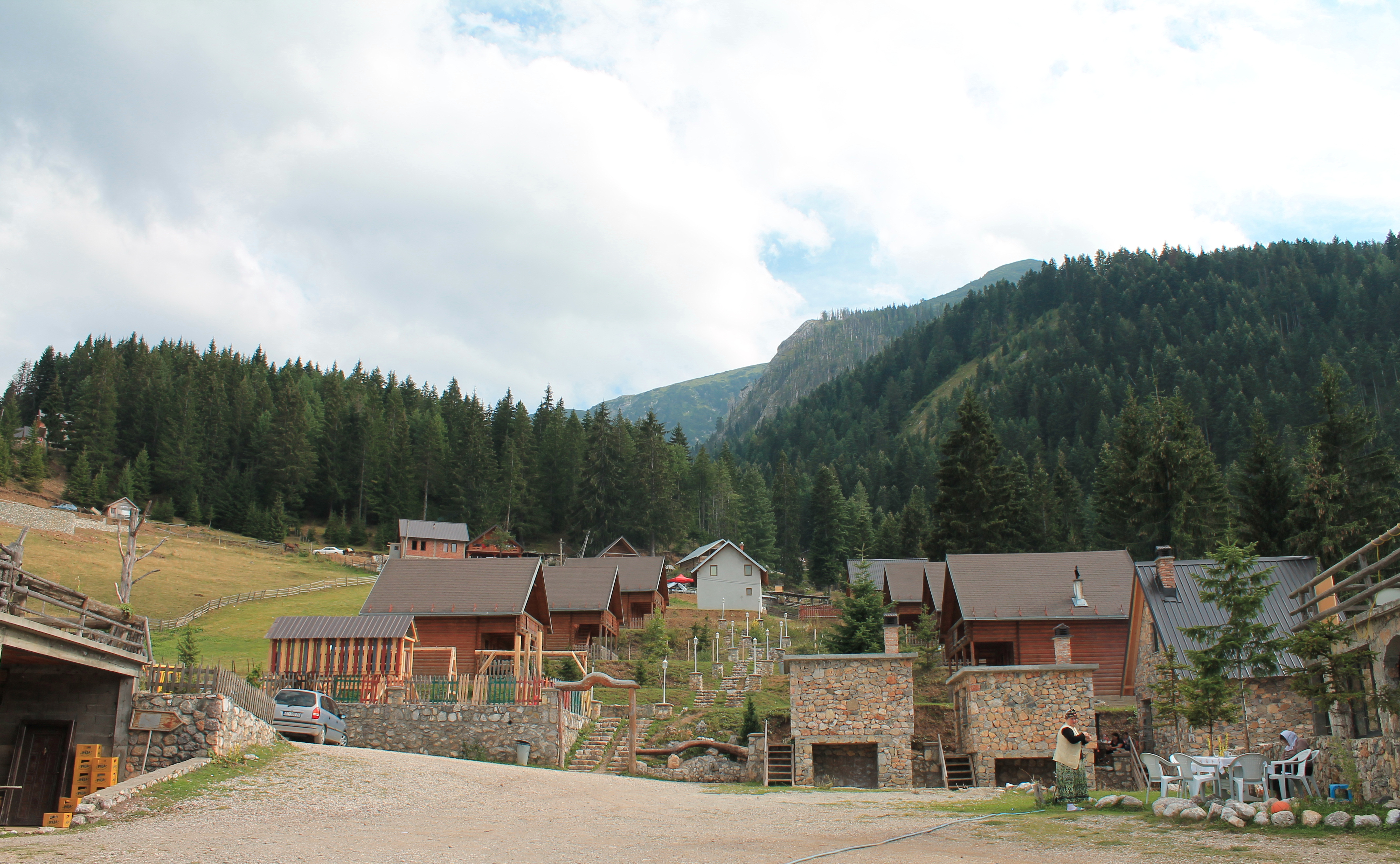 Gryka e Rugovës - Pejë (3)